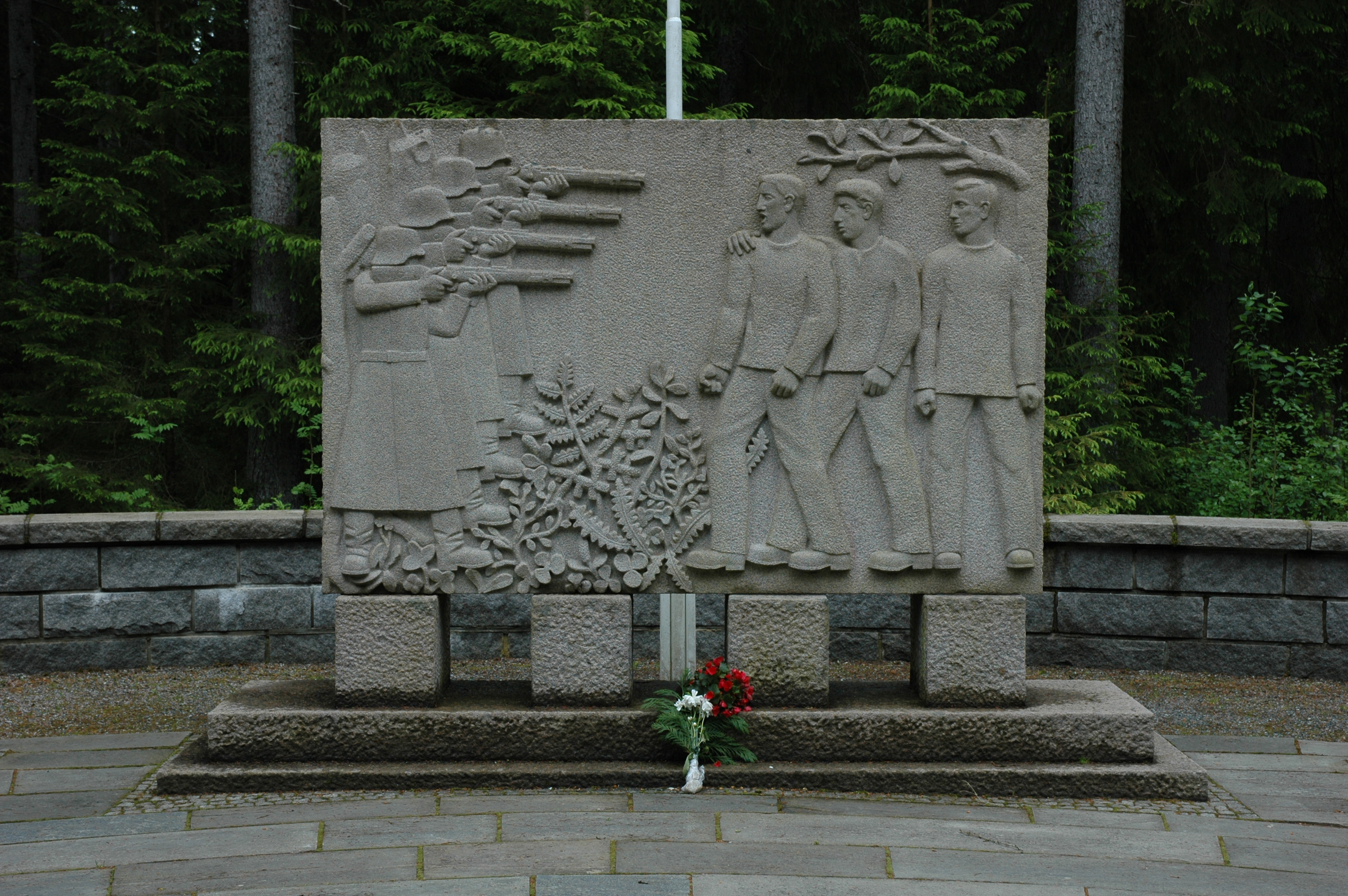 Falstadskogen. Odd Hilts monument "Arkebusering i fangeleiren" fra 1947. The Falstad Forest. Odd Hilt's monument (1947). Foto / Photo: Arne Langås, Falstadsenteret År / Year: 2011